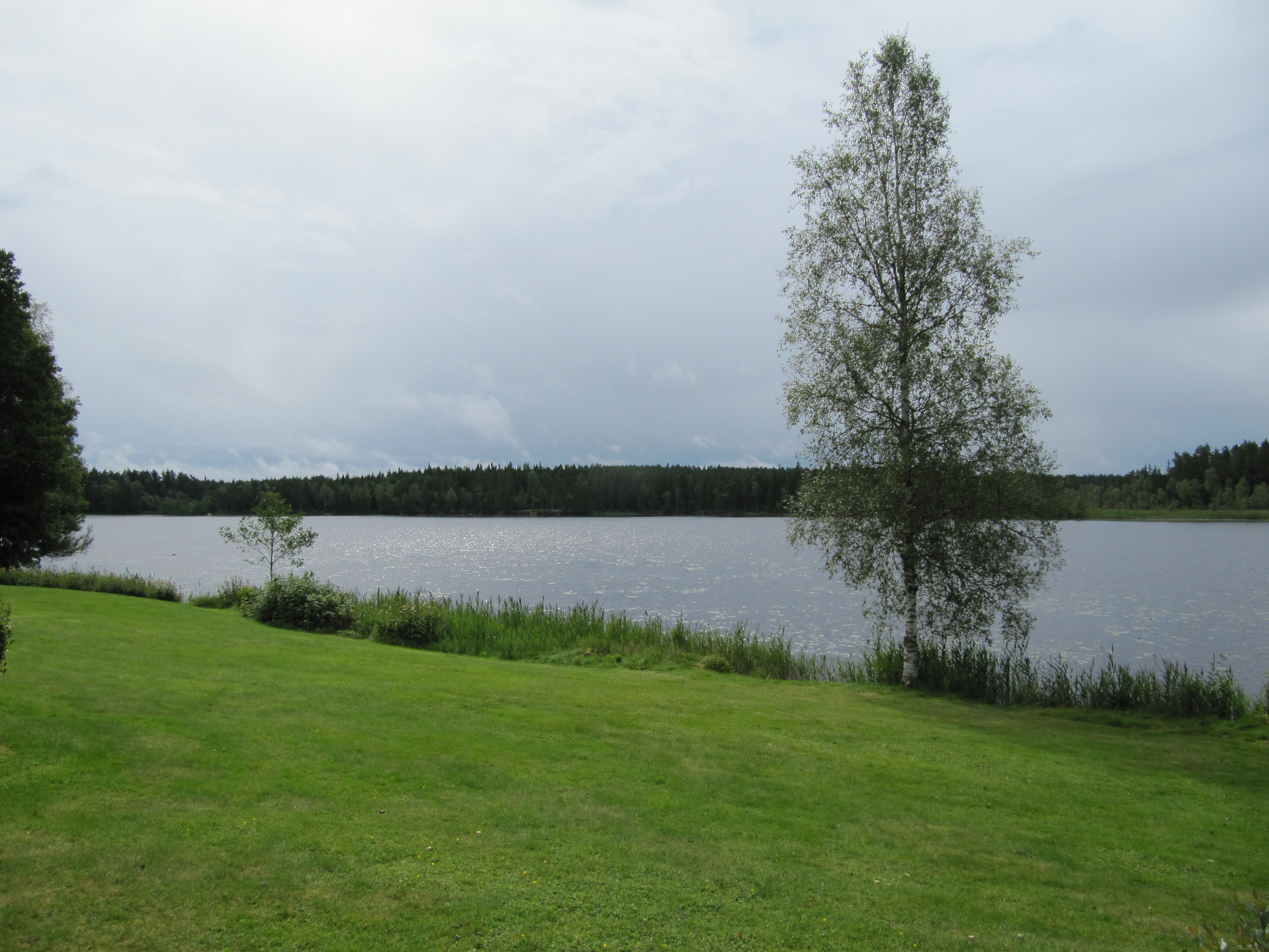 Stomsjön från kyrkogården vid Ljungsarps kyrka